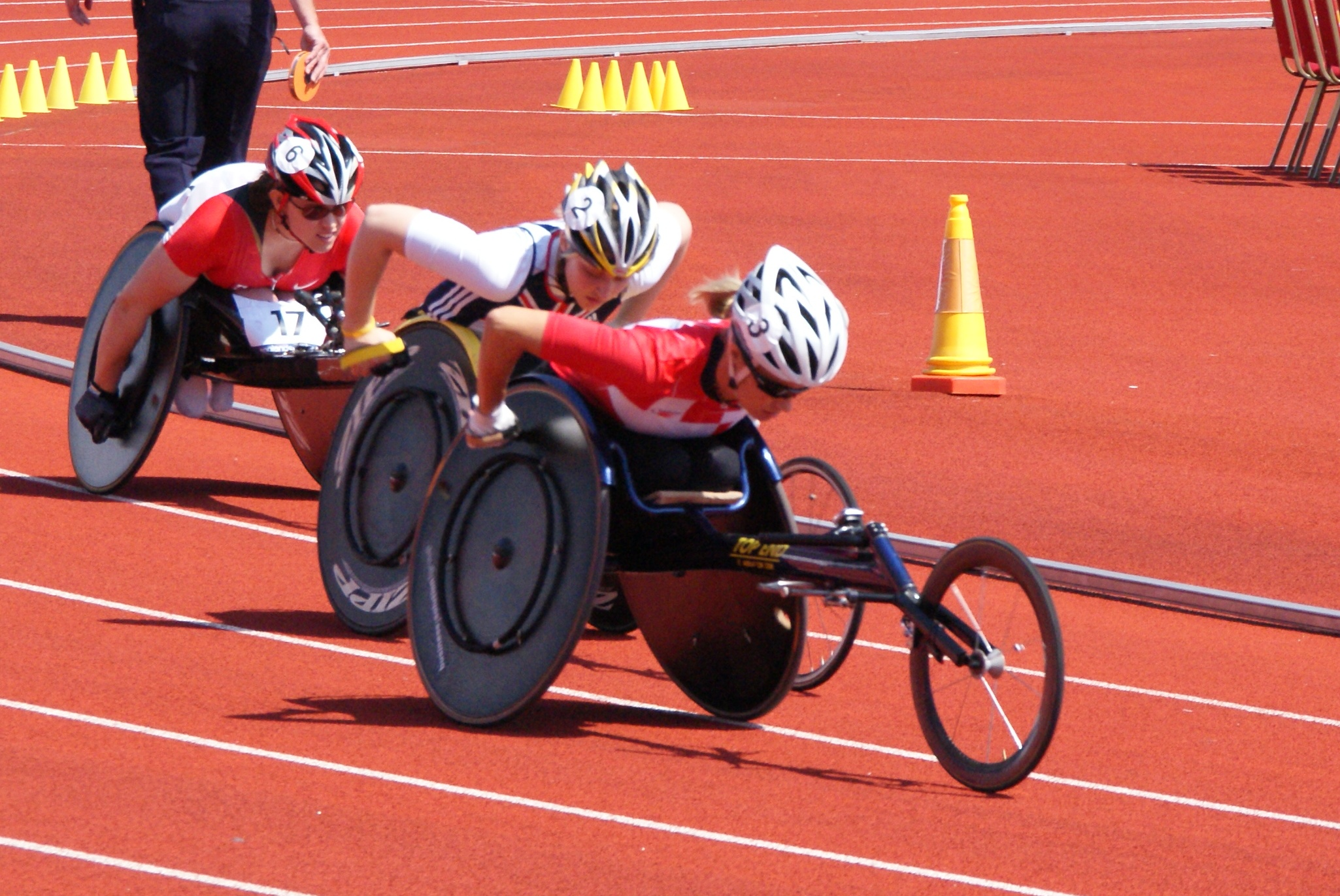 BT Paralympic World Cup 2009 friidrett: T54 - 800 meter. T54 - 800 meter. Woods (#65 GBR), Hunkeller (#113 SUI), McFadden (#139 USA), McClammer (#138 USA), Matassa (#17 CAN), Von Buren (#114 SUI)